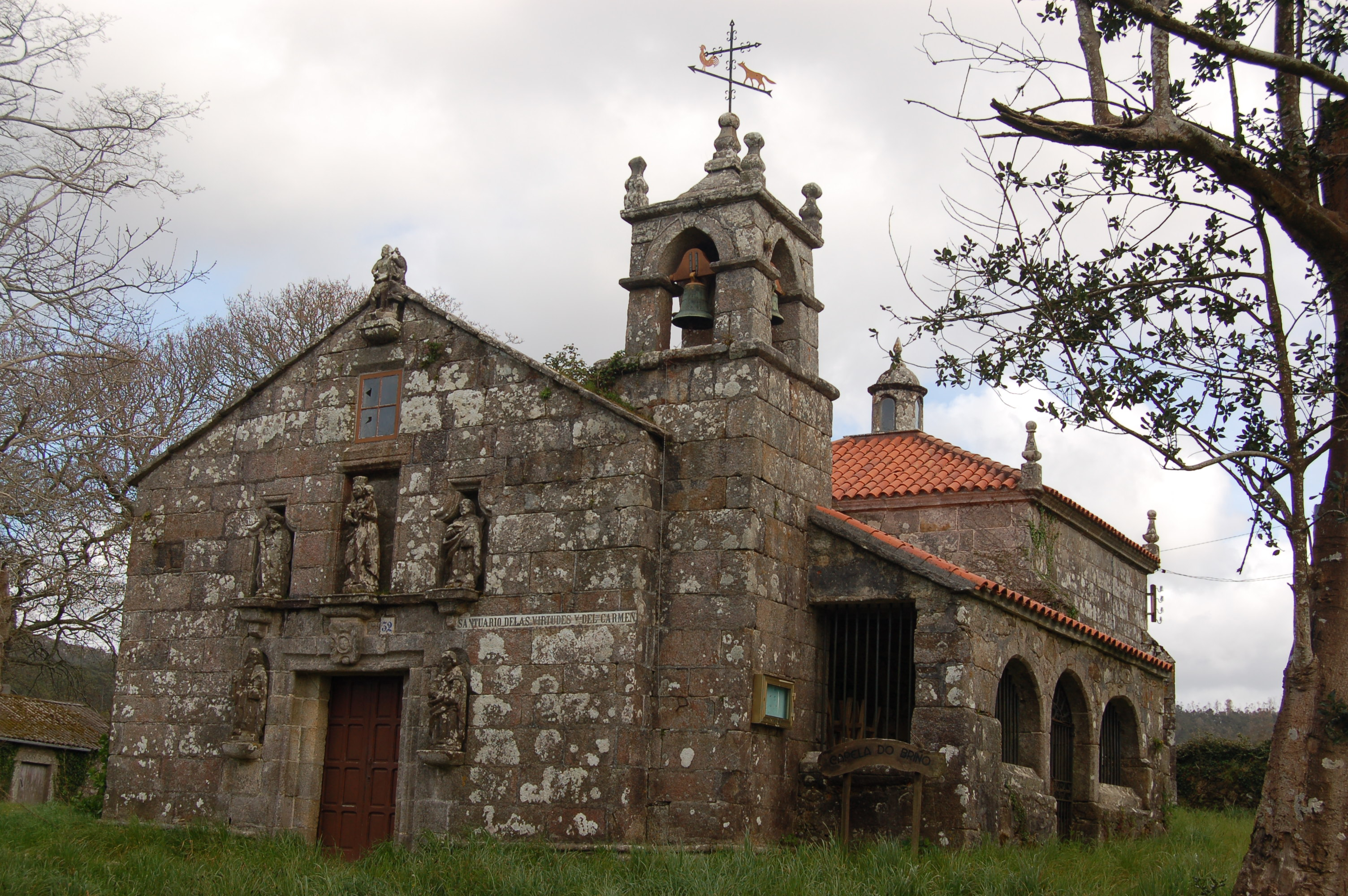 Capela das Virtudes e do Carme do Briño (Borneiro, Cabana de Bergantiños).